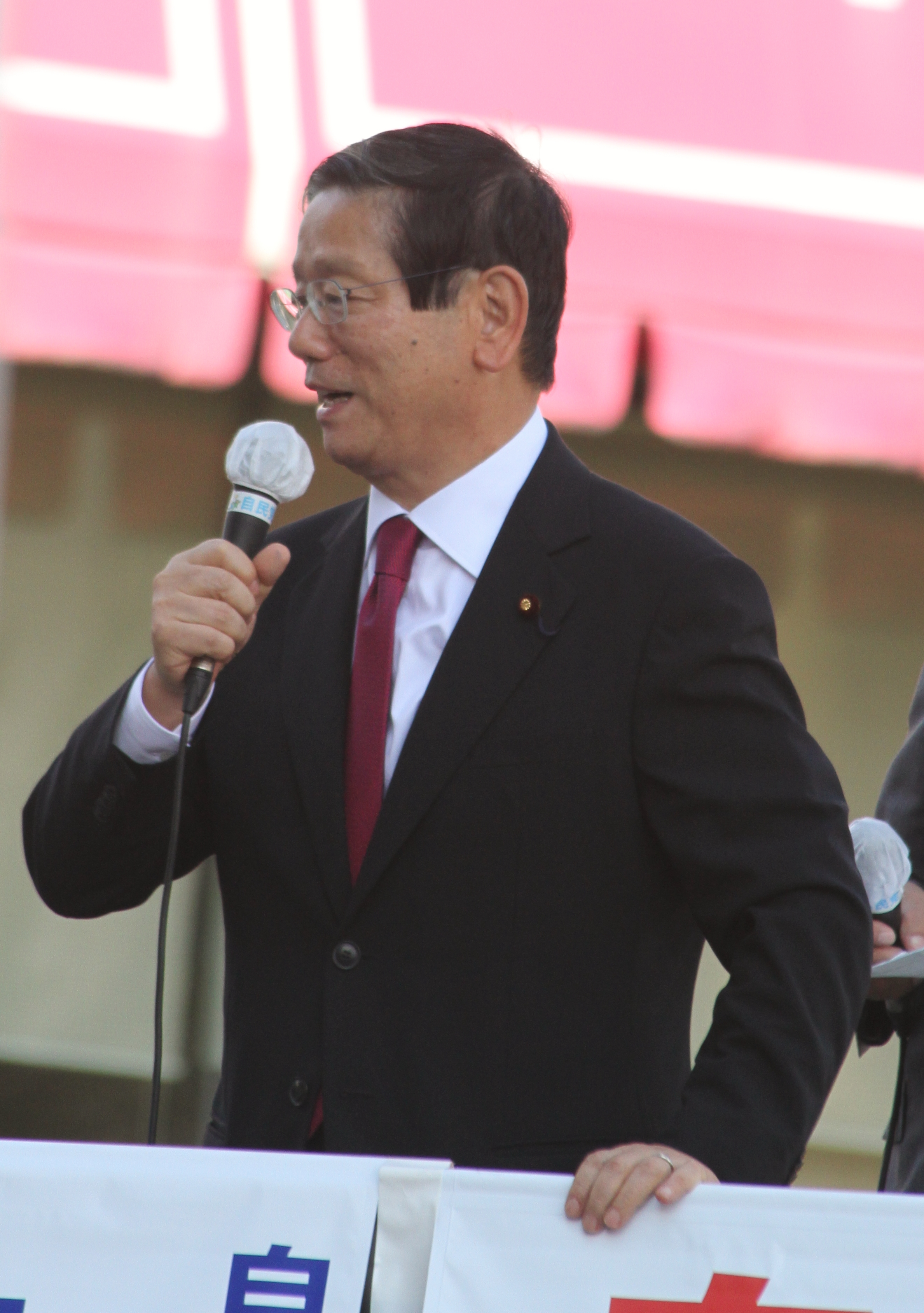 2012年自由民主党総裁選挙 街頭演説（町村信孝）